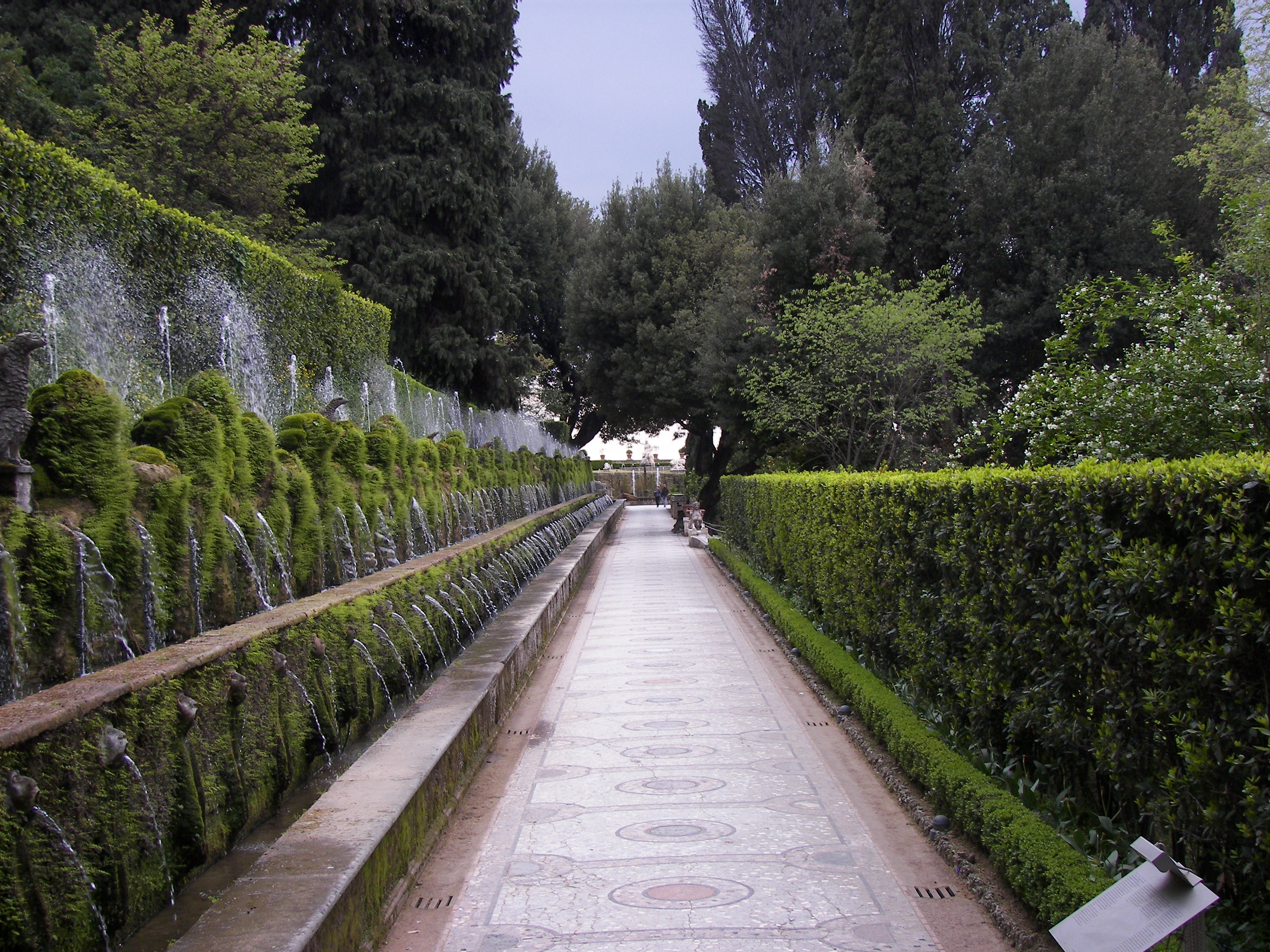 Fountains at Villa d'Este in Tivoli.